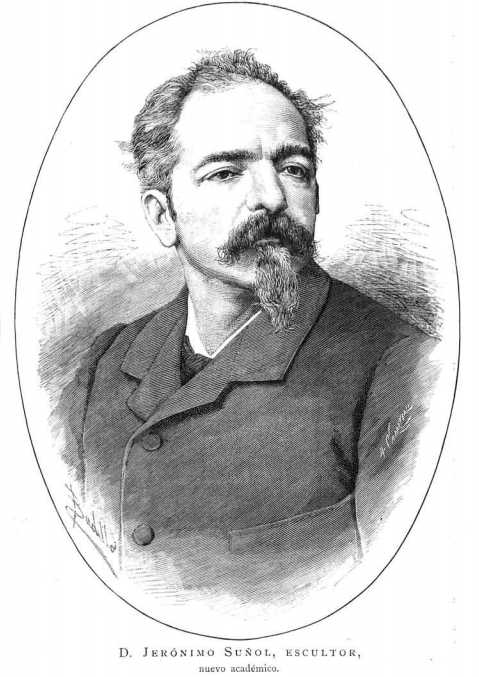 D. Jerónimo Suñol, escultor, nuevo académico.